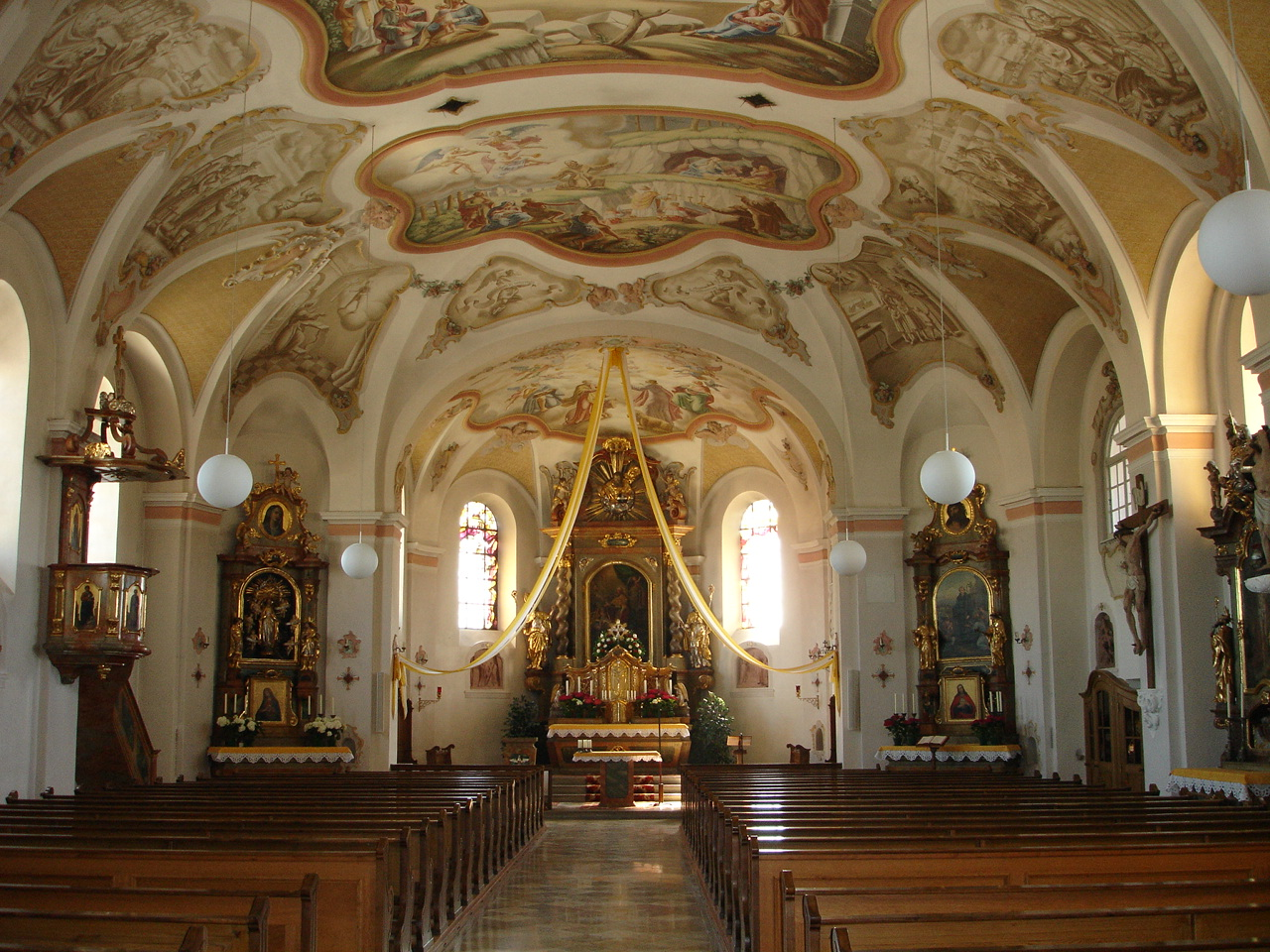 Katholische Pfarrkirche St. Martin in Saaldorf/Oberbayern